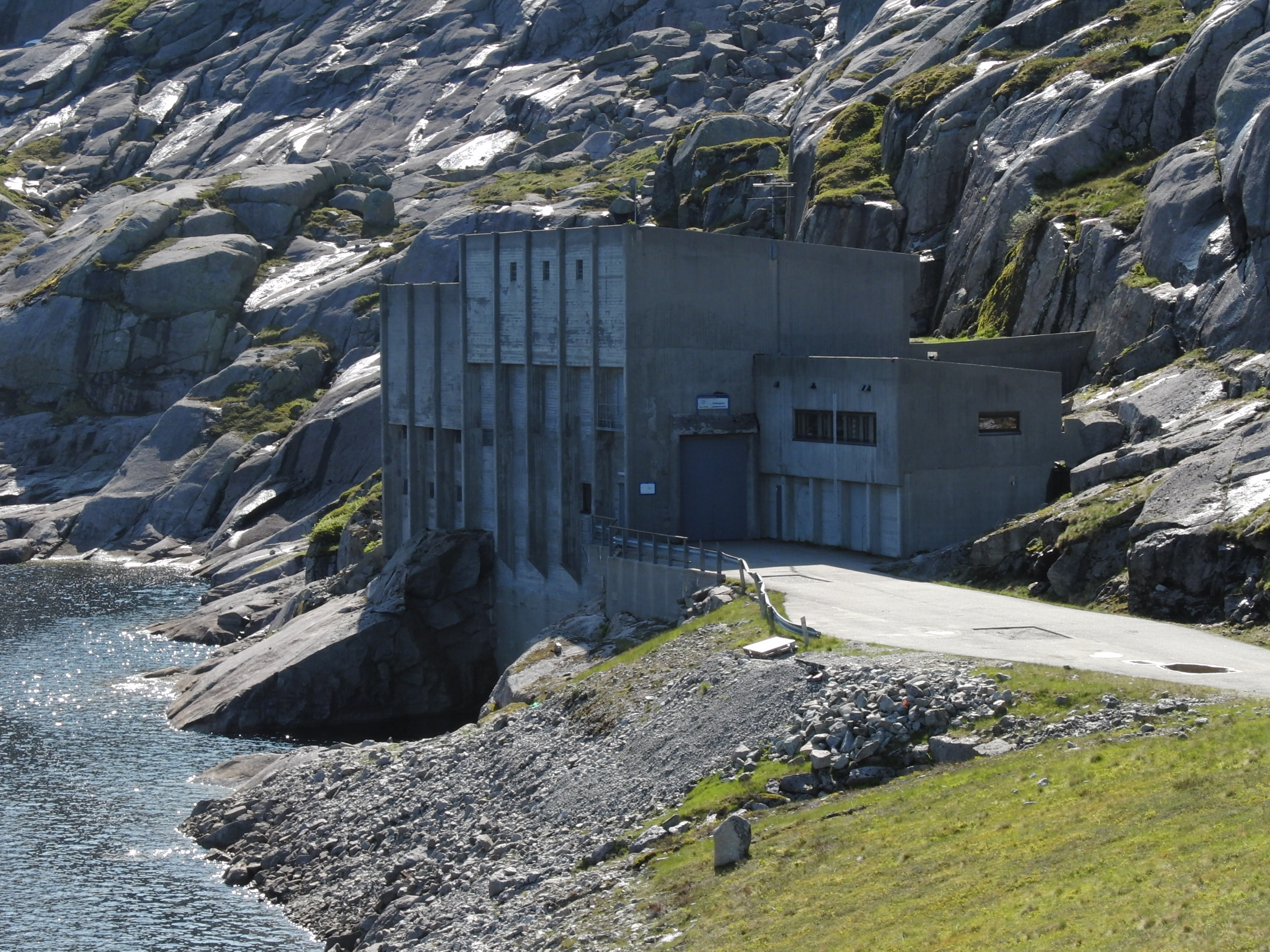 Tjodanpollen pumpe